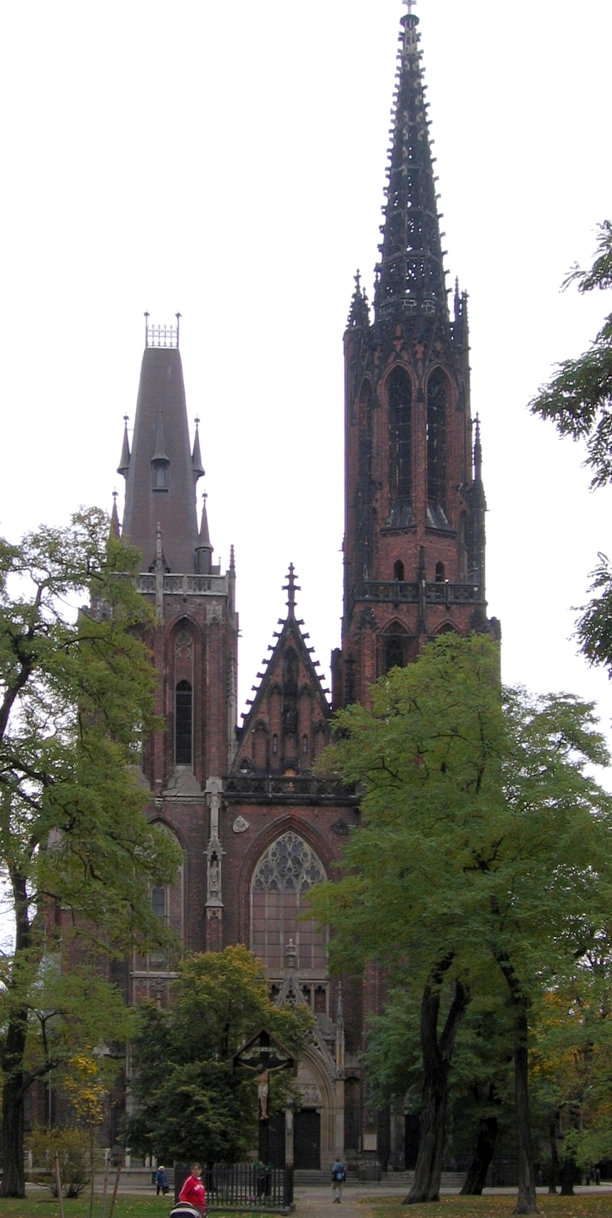 Wrocław, Poland - St.Michael Archangel Church